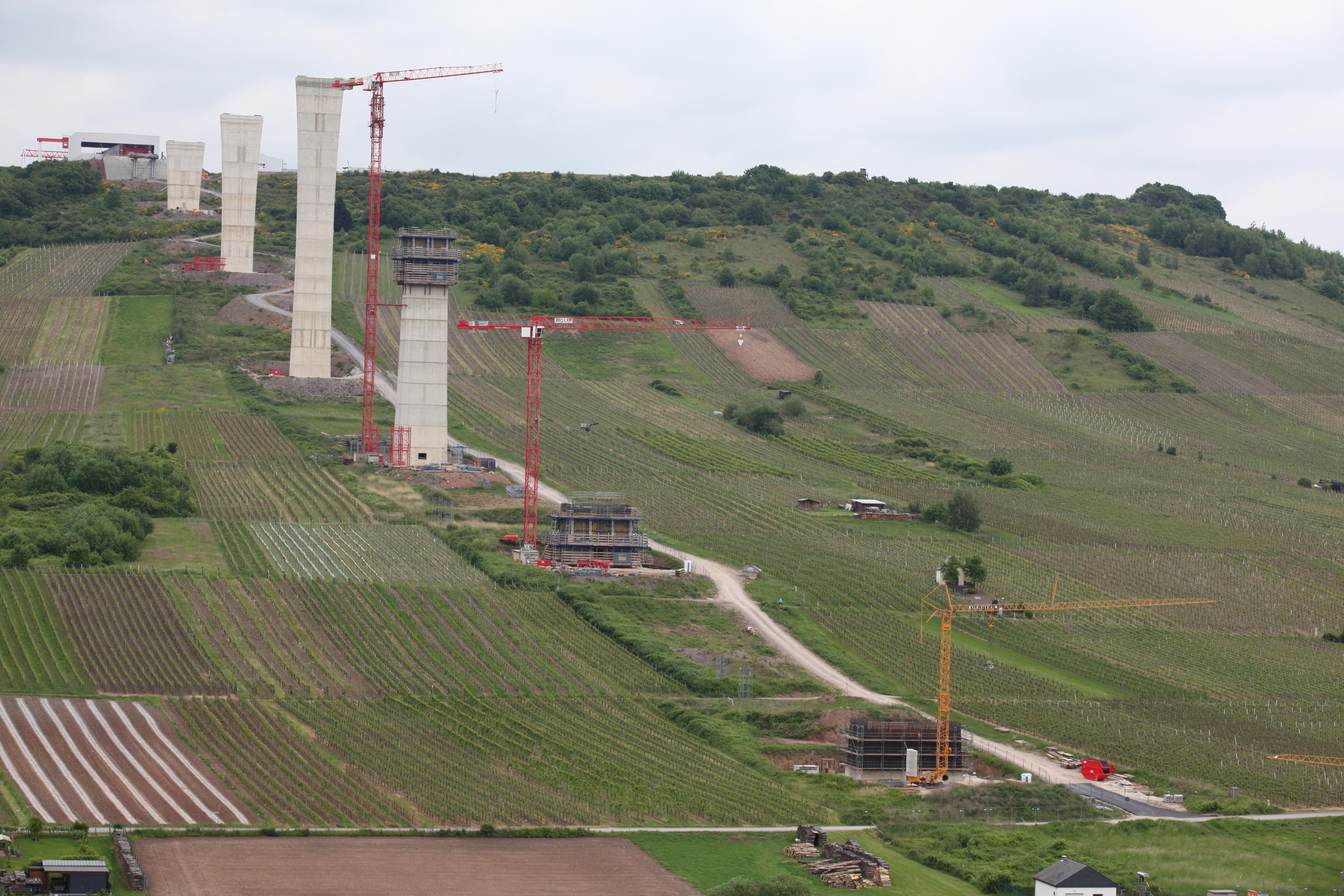 Hochmoselbrücke